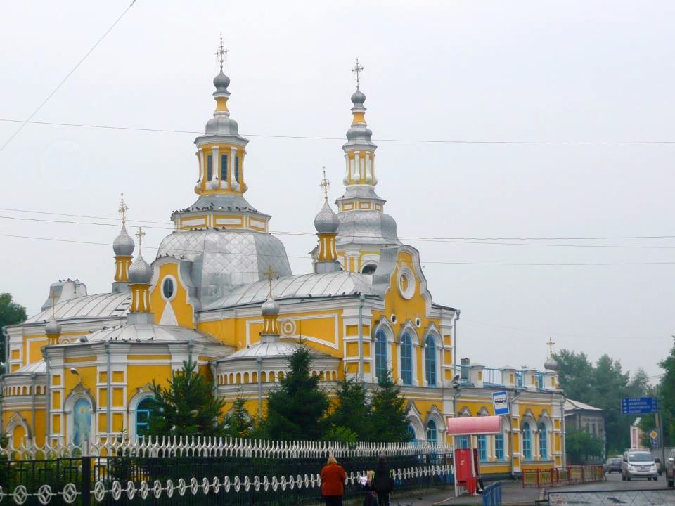 Ансамбль Спасской церкви: улица Комсомольская, 10, Минусинск, Красноярский край